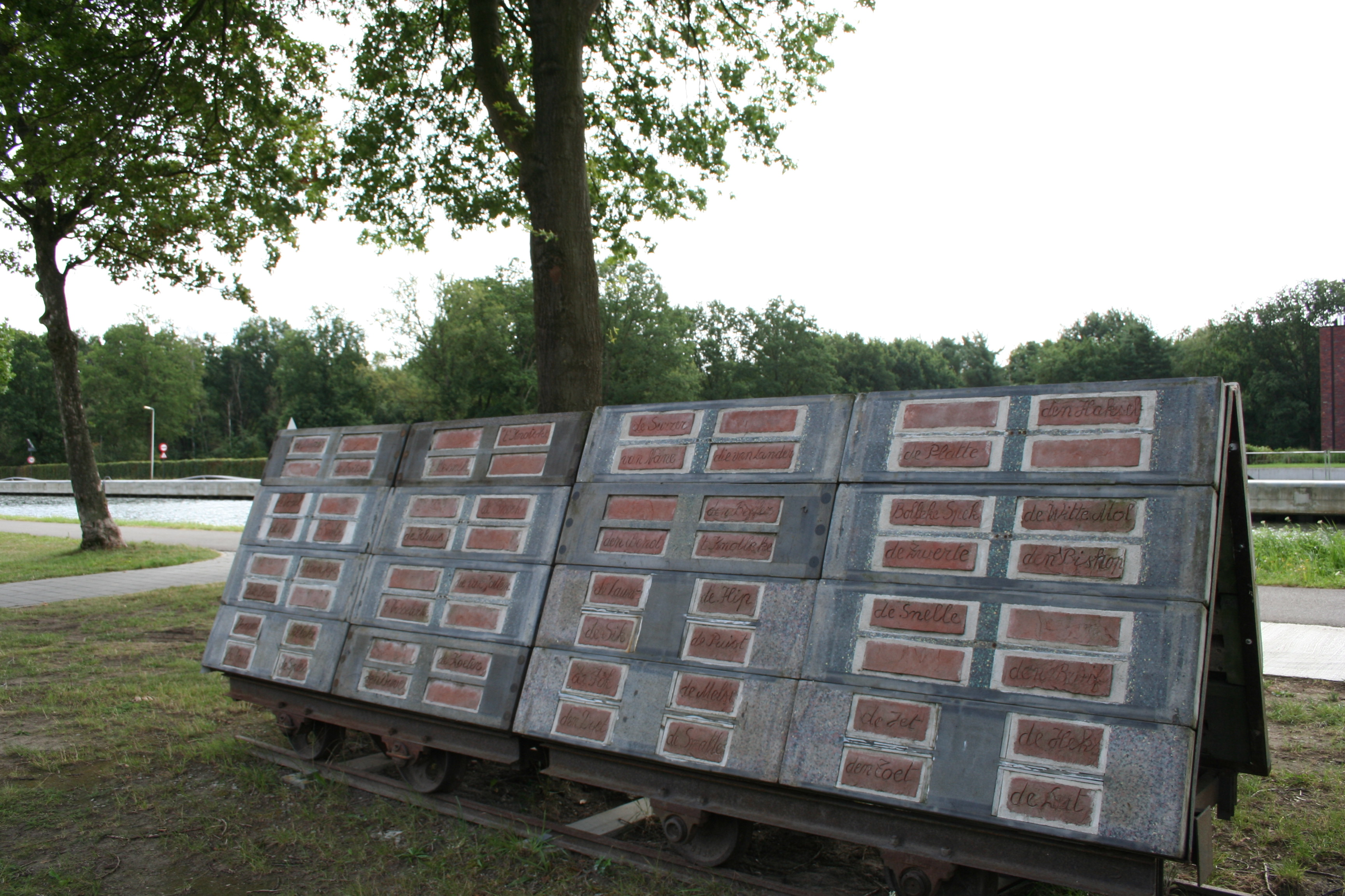 Oud karretje dat gebruikt werd in de vroegere steenfabriek in Sint-Jozef Rijkevorsel. Het karretje maakt deel uit van het project De Cementzakken.